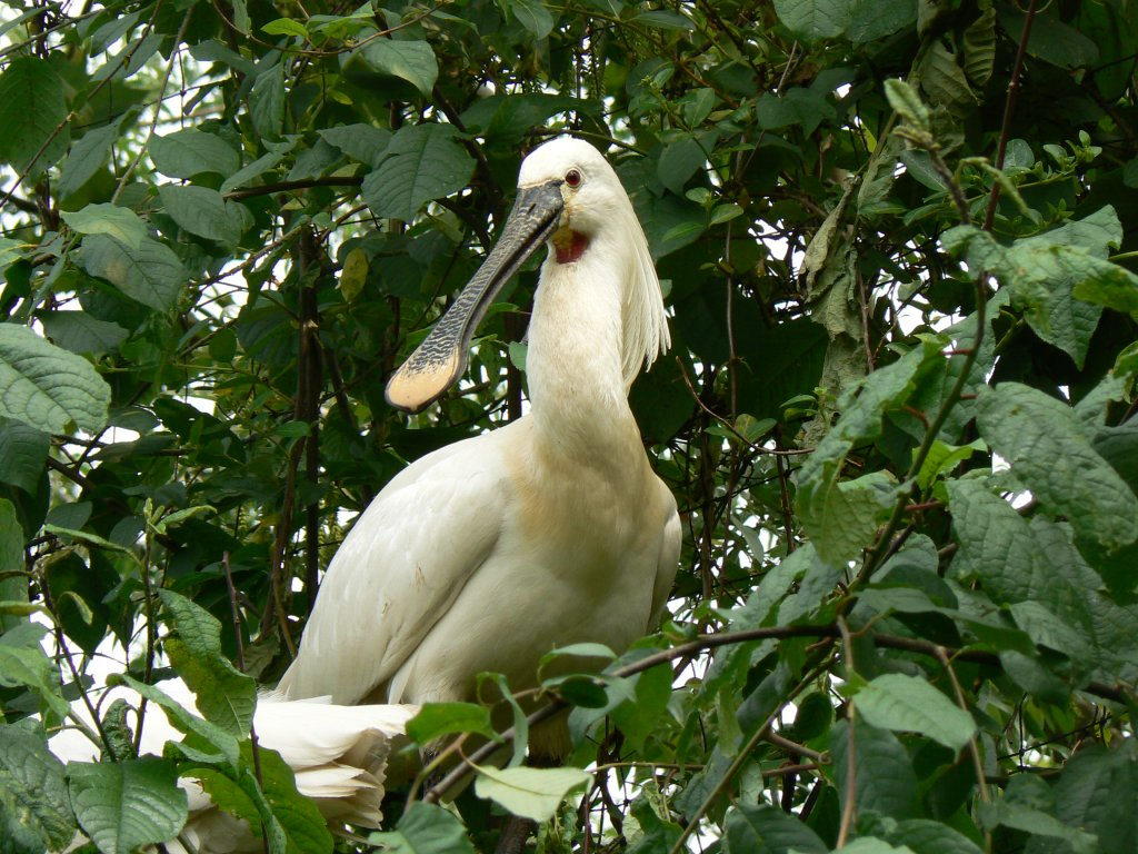 Common Spoonbill Platalea leucorodia on nest, S. Alessio Oasi zoo, Pavia, Italy